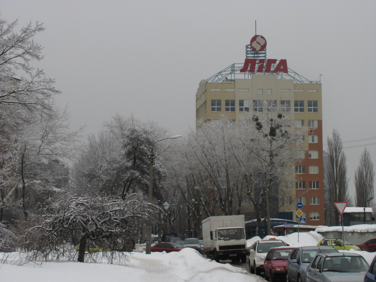 Ліга